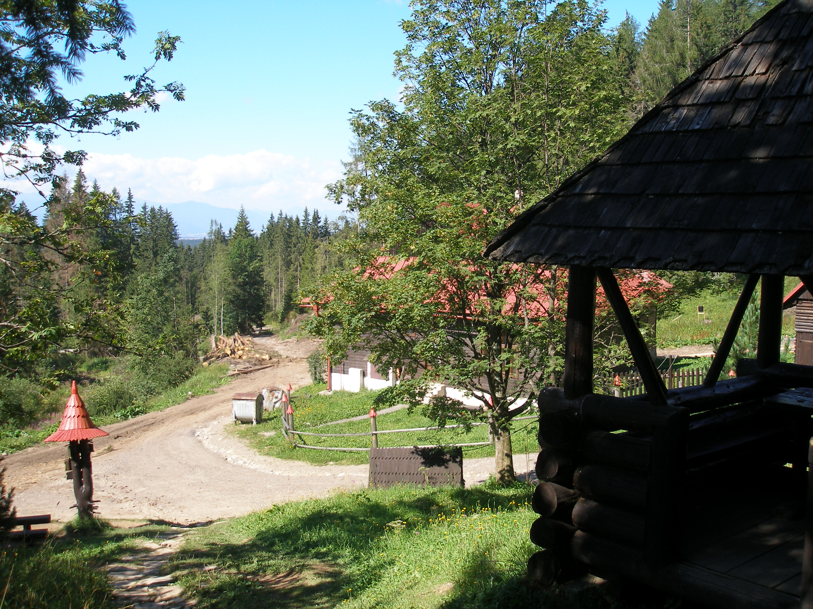 Tri Studničky, pôvodne na starých mapách označené ako Tri studne sú turisticky známym miestom pri Podbanskom vo Vysokých Tatrách. V lokalite sa nachádzajú drevené domčeky patriace lesnej správe. Pri dobrej viditeľnosti je vidieť tatranský štít Kriváň.